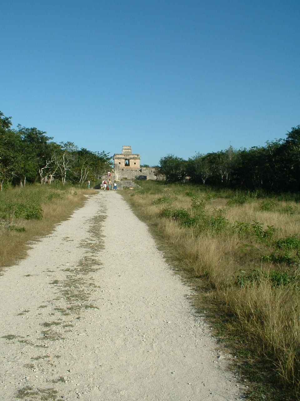 Sacbe at Dzibilchaltun ruin, Yucatan, MX.